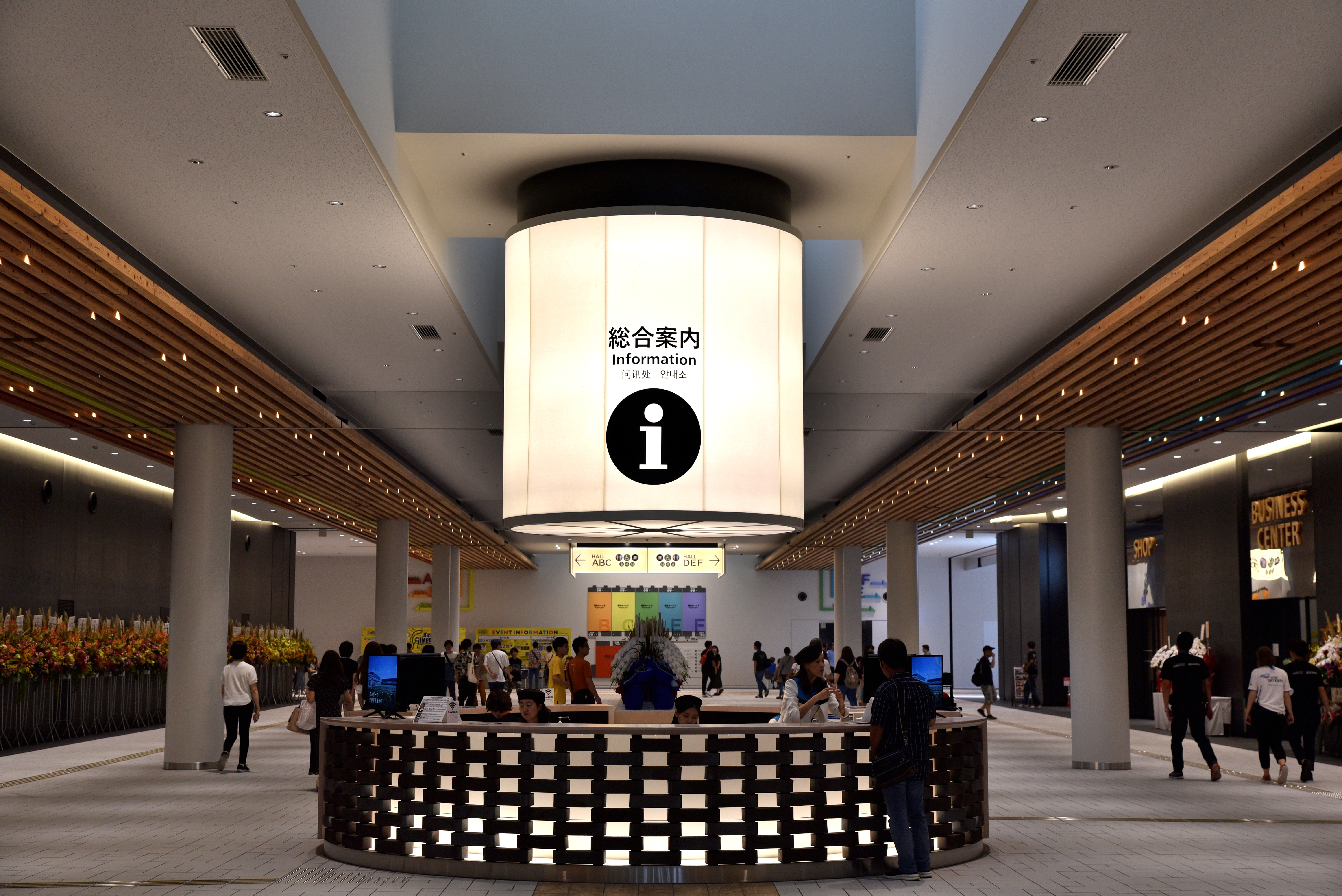 愛知県国際展示場の総合案内所